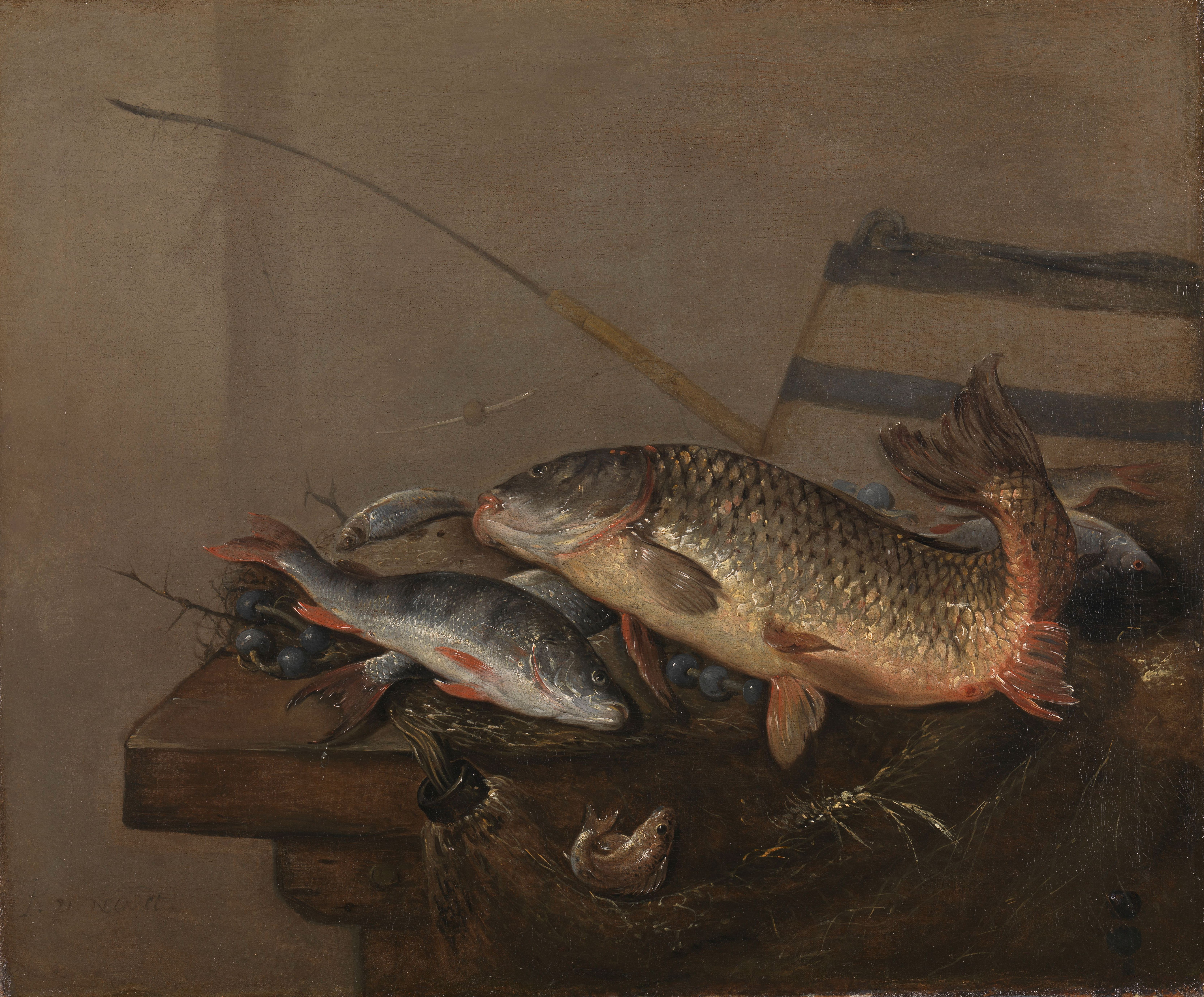 Visstilleven. Stilleven met verschillende soorten vis (karper, baars) uitgestald op een visnet op de hoek van een tafel. Op de achtergrond een hengel met lijn en dobber en een emmer.